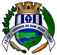 Brasão de Córrego do Bom Jesus, Municípios de Minas Gerais